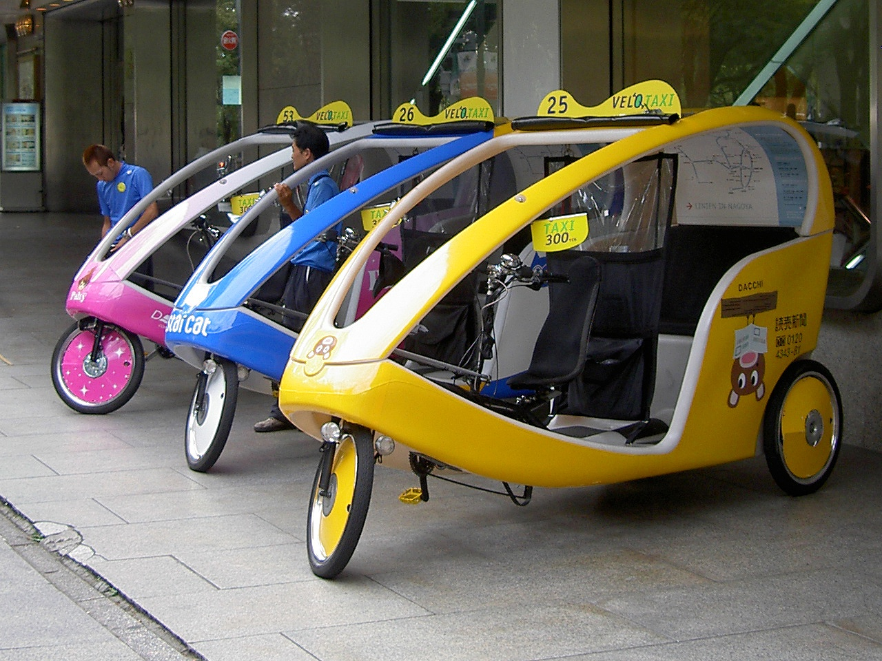 VELOTAXI in Nagoya, Japan